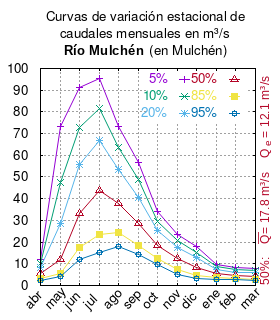 Curvas de variación estacional del río Mulchén en Mulchén. # Dirección General de Aguas # Diagnóstico y clasificación de los cursos y cuerpos de agua según objetivos de calidad. Cuenca del río Biobío. # Santiago de Chile # Ministerio de Obras Públicas (Chile) # 2004 # url: # urlarchivo: # Tabla 4.13: Estación Mulchén en Mulchén pág.84 mes 5% 10% 20% 50% 85% 95% abr 12.19 10.21 8.24 5.46 3.30 2.45 may 73.45 47.46 28.47 11.82 5.44 4.18 jun 91.35 72.99 55.61 33.08 17.44 11.98 jul 95.47 81.74 66.89 43.60 23.33 15.18 ago 73.32 63.53 53.33 37.93 24.25 18.04 sep 56.57 48.65 40.53 28.58 18.59 14.44 oct 33.95 29.65 25.16 18.38 12.36 9.63 nov 23.67 20.71 17.49 12.33 7.39 5.08 dic 17.75 15.33 12.69 8.49 4.75 3.20 ene 9.51 8.53 7.41 5.55 3.72 2.86 feb 8.15 7.18 6.17 4.64 3.28 2.67 mar 7.84 6.85 5.81 4.25 2.89 2.30 This plot was created with Gnuplot.